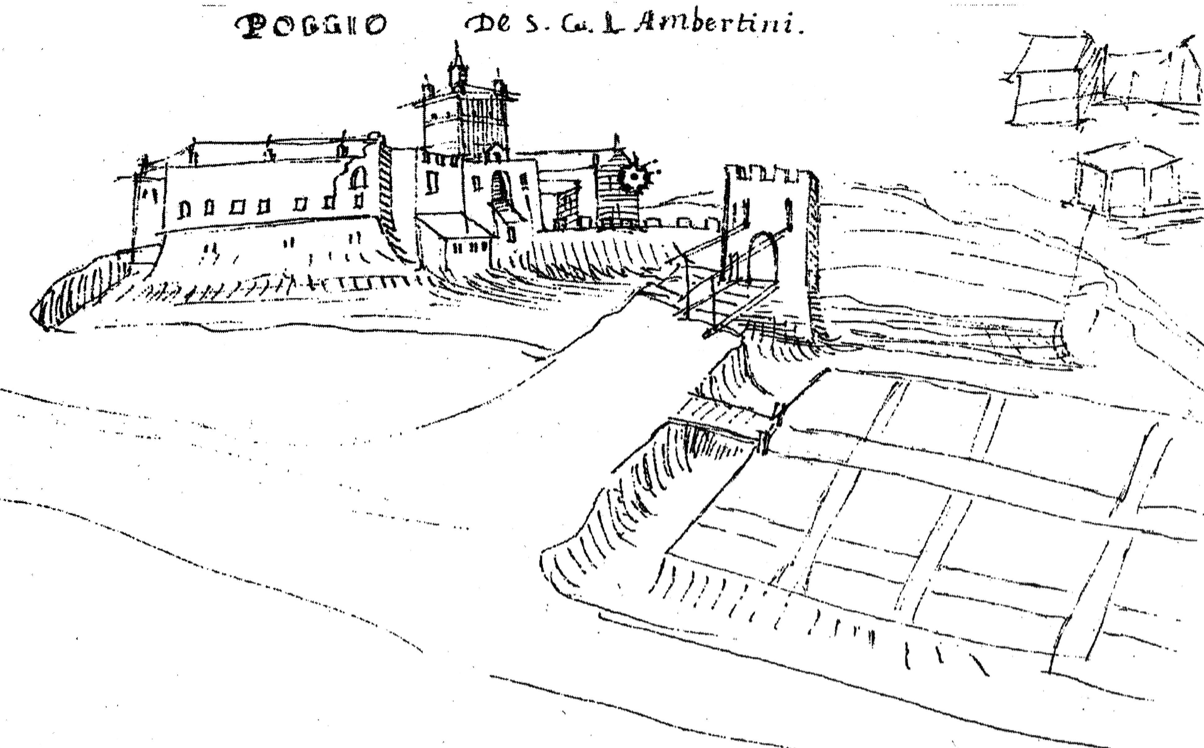 Disegno del Castello Lambertini di Poggio Renatico realizzato da E. Danti nel 1578.